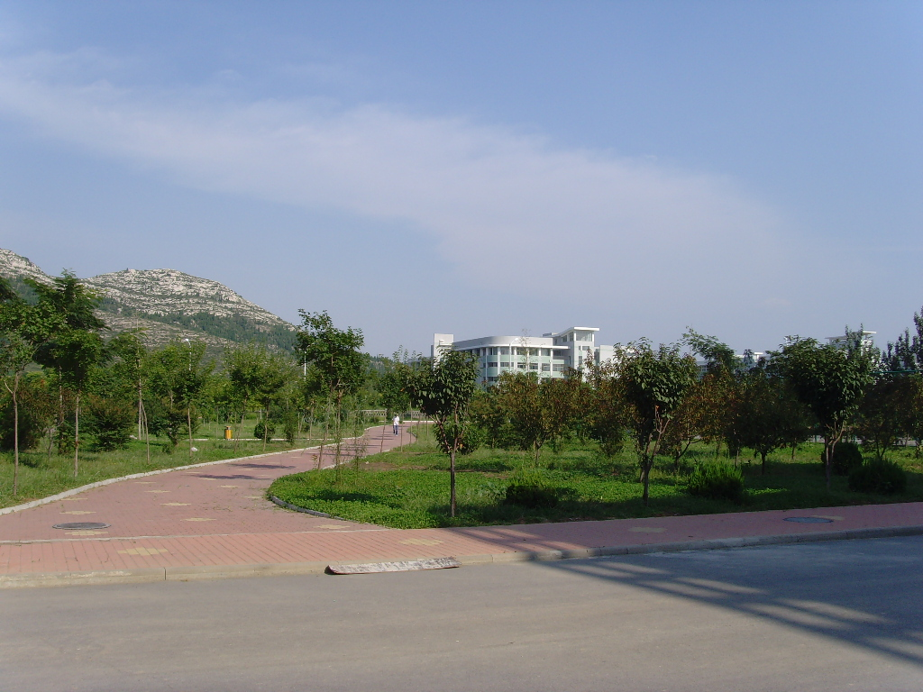 中华女子学院山东分院长清校区校园照片，自己拍摄